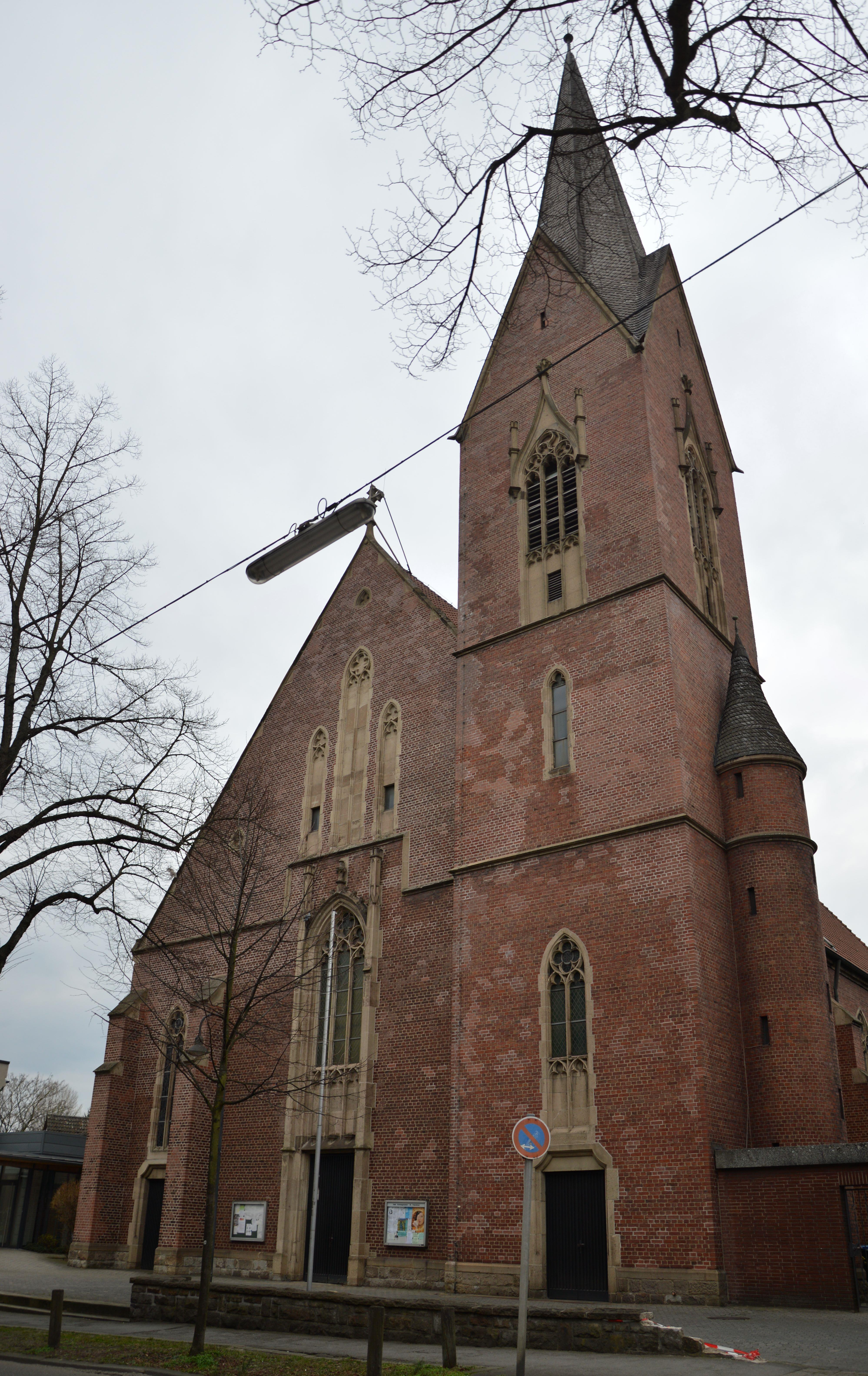 St. Franziskuskirche in WItten